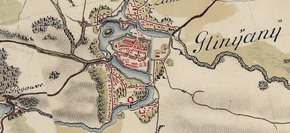 xviii